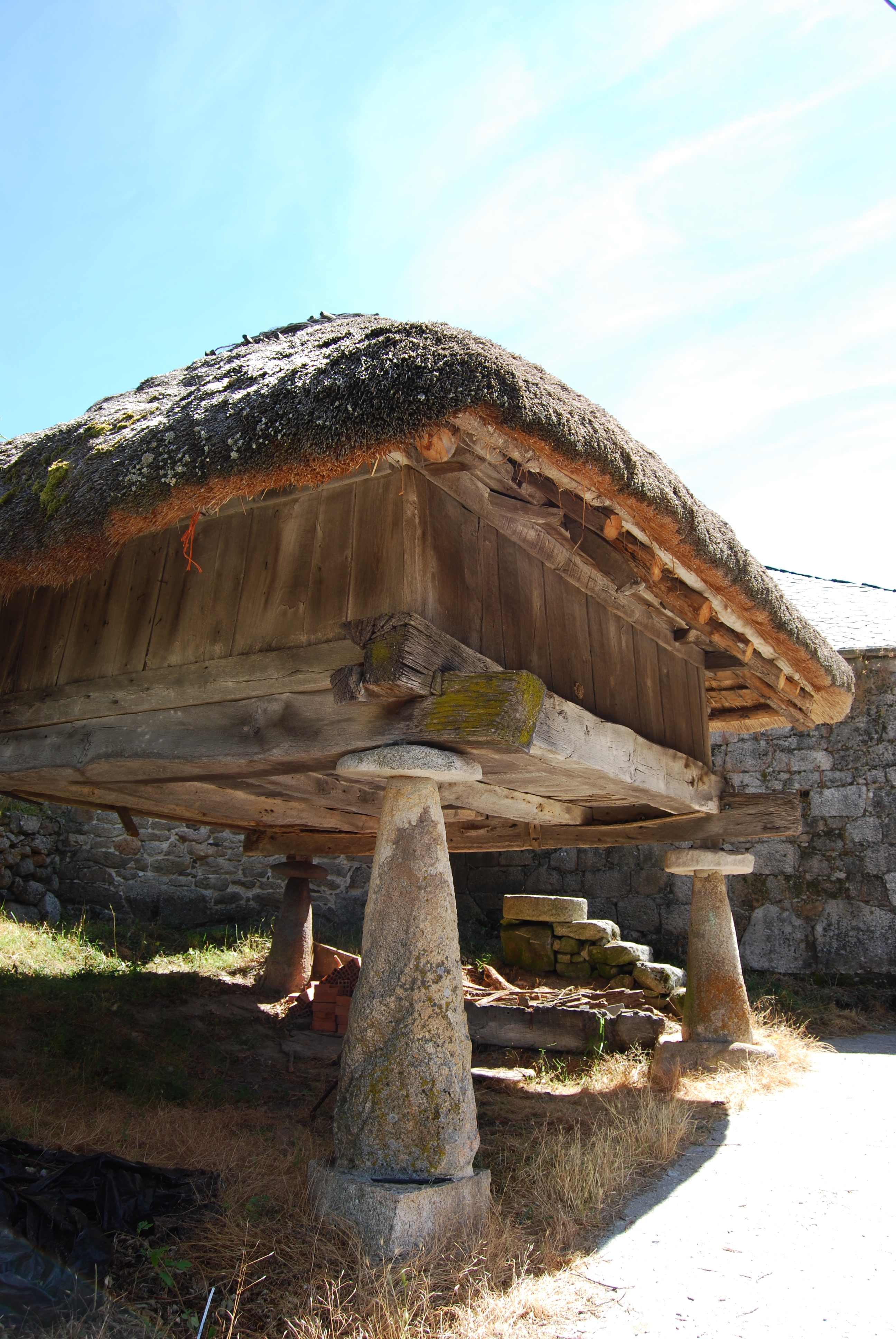 Hórreo tipo asturiano, O Piornedo, Cervantes